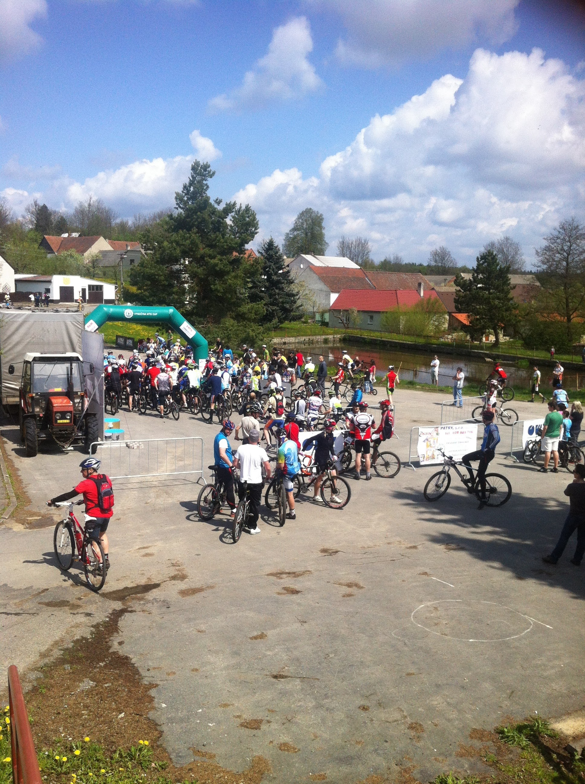 Pohled na start od kulturního domu v Lovětíně